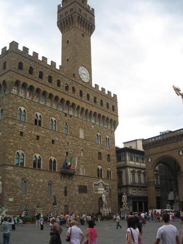 Палаццо Веккьо, (Старый дворец), Флоренция